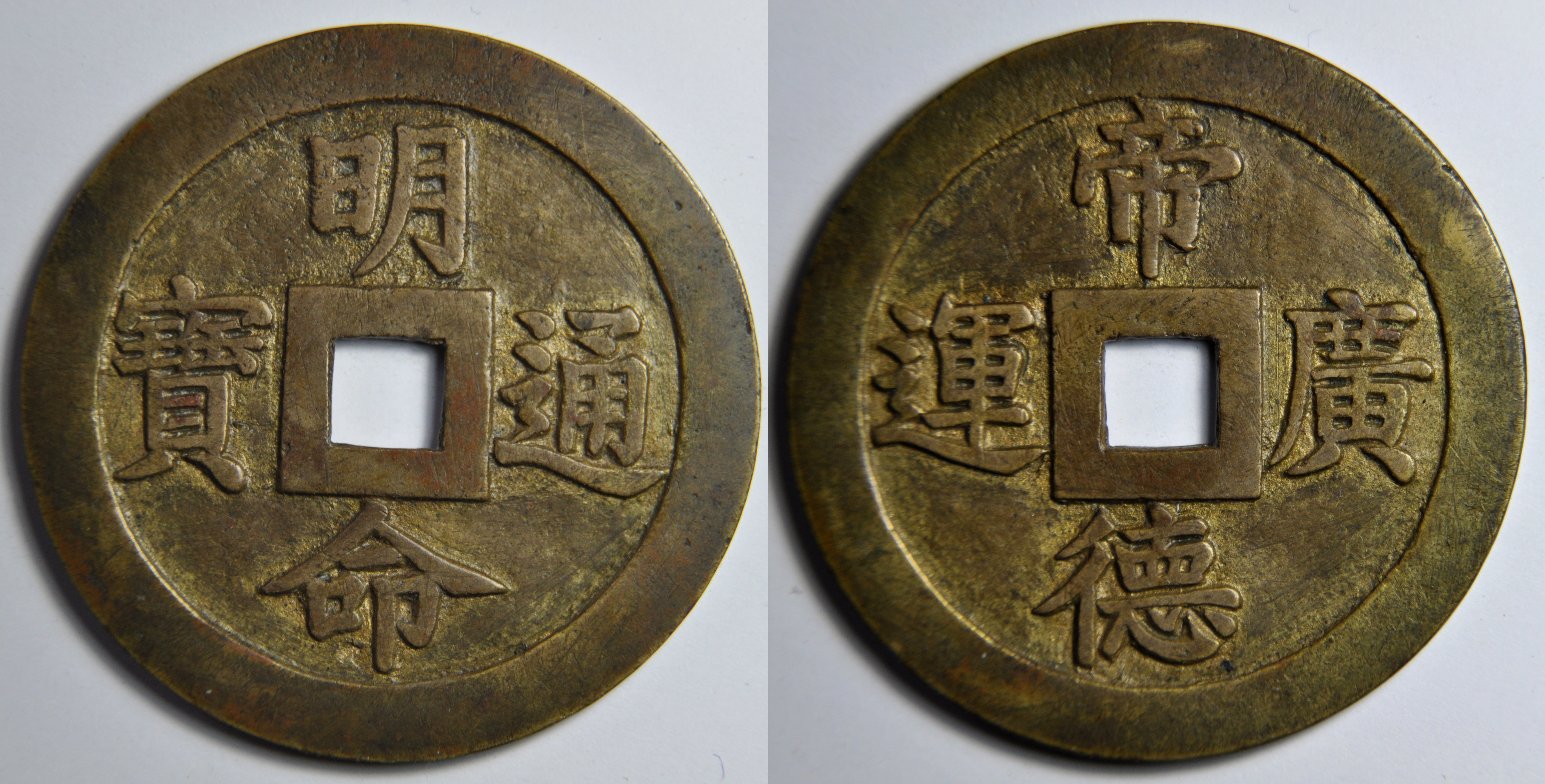 Une monnaie en laiton d'un mach ou 60 dong, appelée monnaie de présentation, émise en 1837 par l'empereur Nguyen Phuc Gao (1819-1840), ère Minh Mang (1820-1840). A/ Minh Mang thong bao (Monnaie courante de Minh Mang) R/ "La vertu de l'empereur est sans limite et toujours agissante" Dimension : 52 mm Poids : 30.2 g. Les monnaies de présentation ont été émises en 1837 avec des maximes tirées des grands classiques. Au total, il y a eu 100.000 pièces avec différentes maximes. Elles sont stockées puis distribuées comme récompense. Référence : Schroeder 153